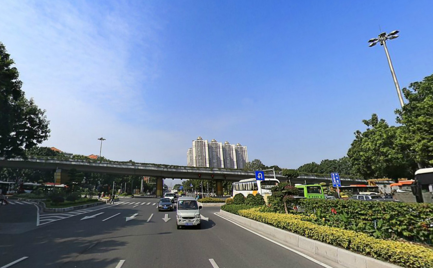 芳村大道与花地大道交汇处。摄于2013年。